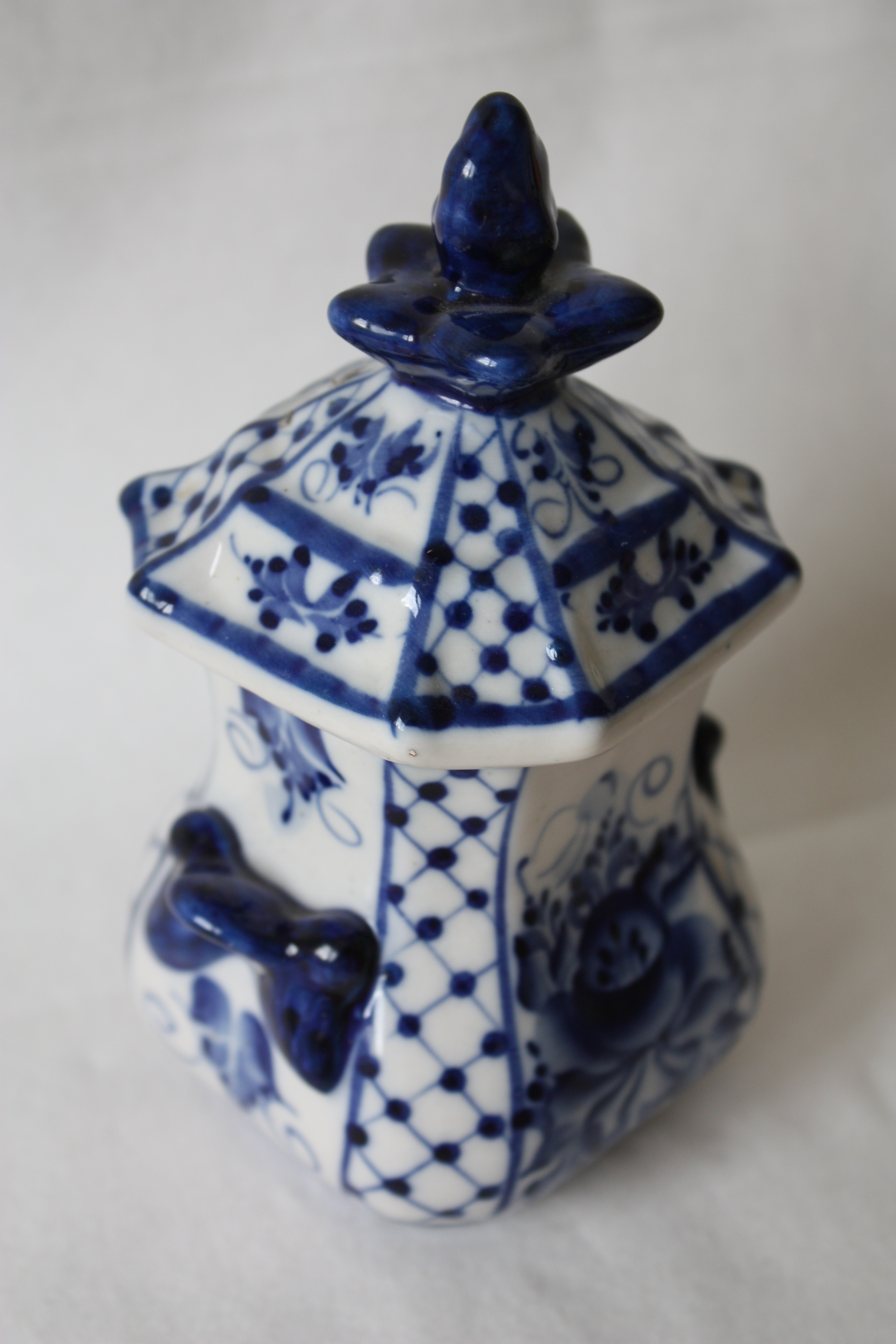 Gschel, Keramik, Russland